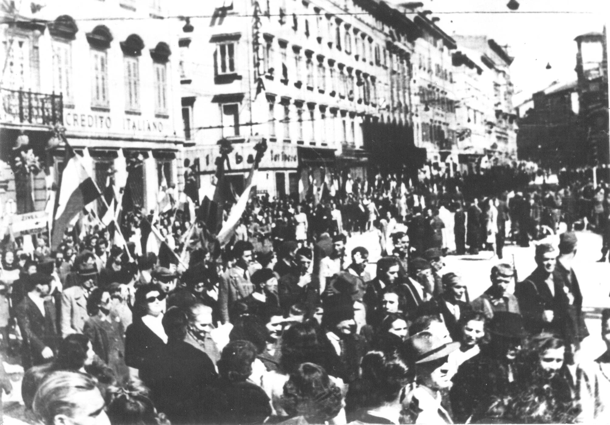 Borci 29. hercegovačke divizije na ulici u oslobođenom Trstu, maja 1945.